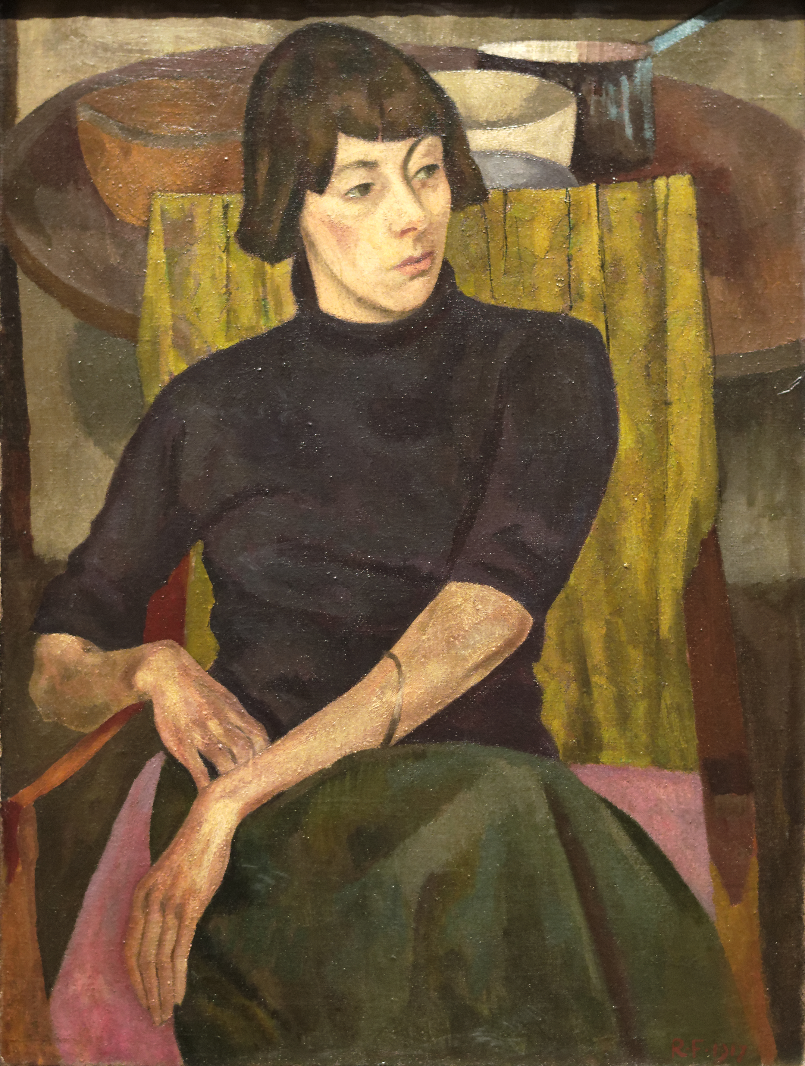 Portrait de Nina Hamnett par Roger Fry